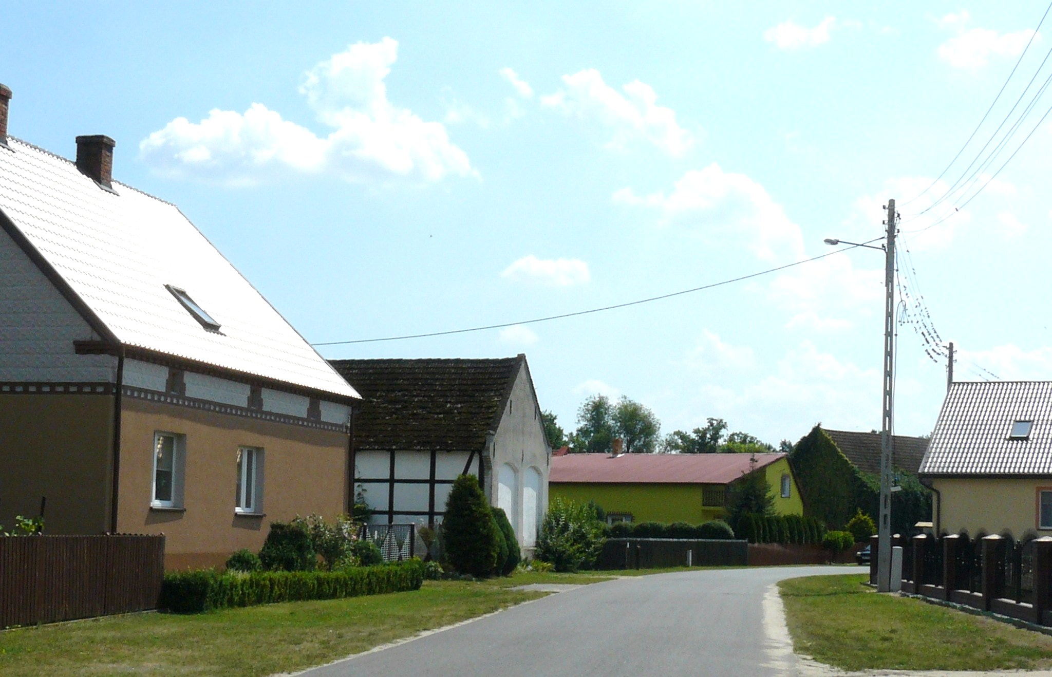 Ruda Żmigrodzka. Widoki ze wsi.